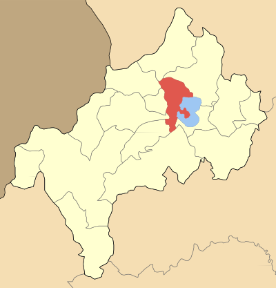 Дем Костур на картата на Ном Костур, Гърция Locator map of Kastorias municipality (Δήμος Καστοριάς) at Kastoria perfecture, Greece).